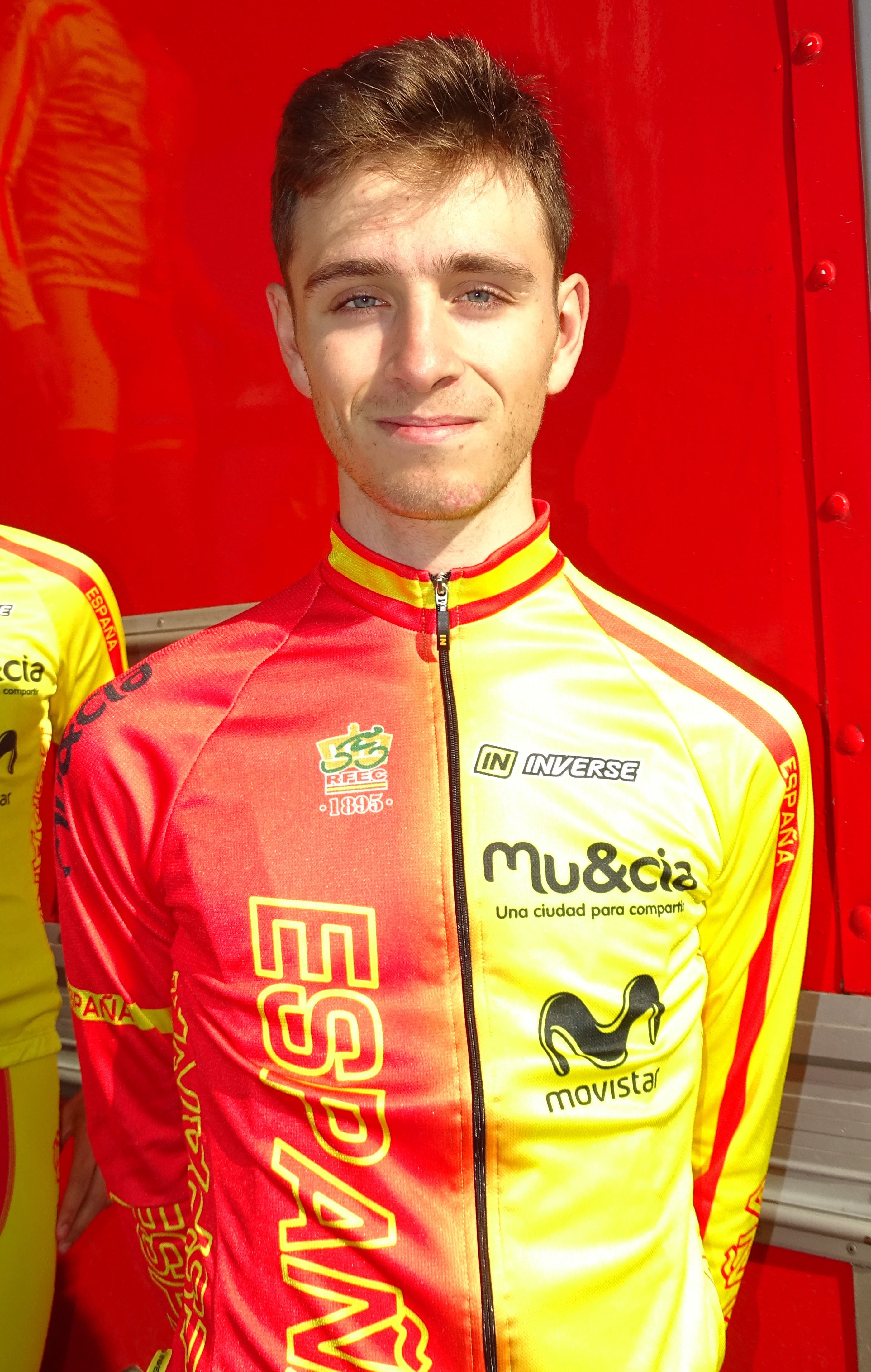 Reportage réalisé le dimanche 10 avril à l'occasion du départ du Paris-Roubaix juniors 2016 à Saint-Amand-les-Eaux, France.